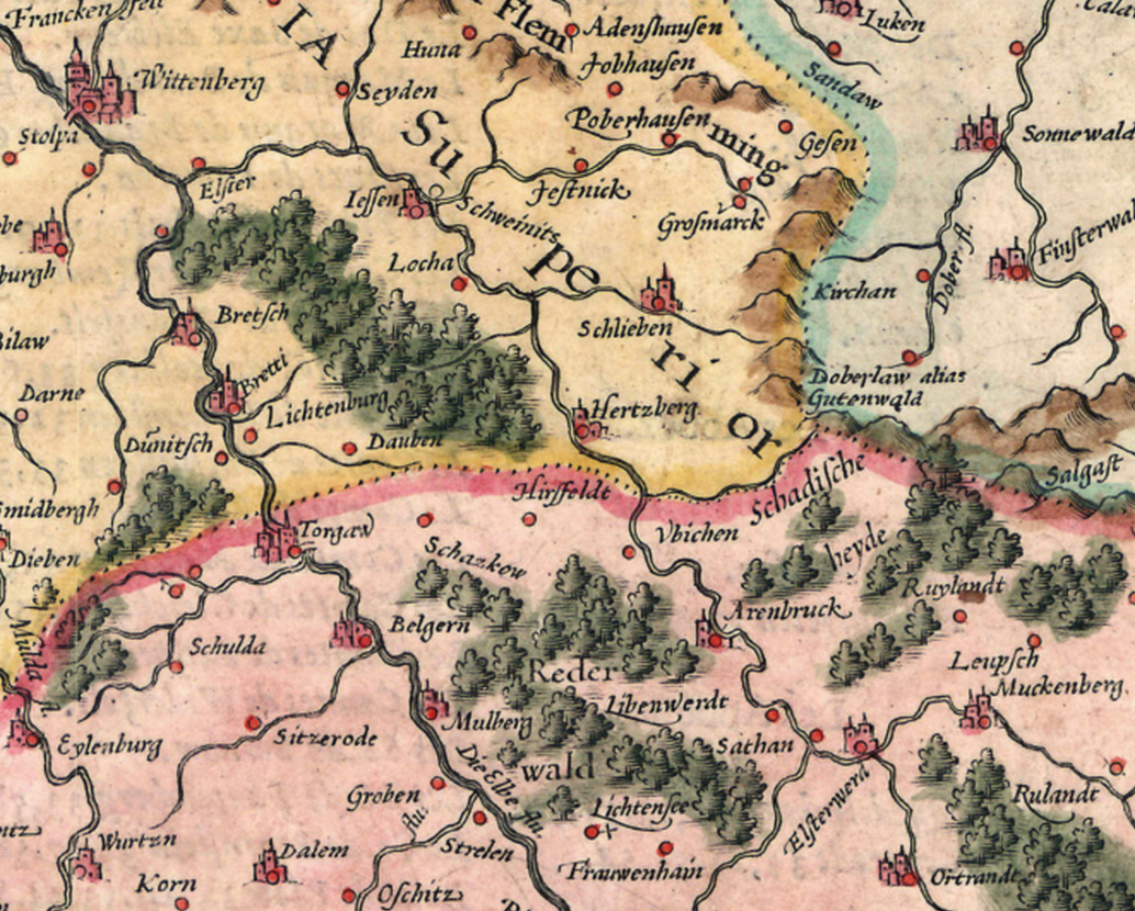 Darstellung des Albe-Elster-Landes